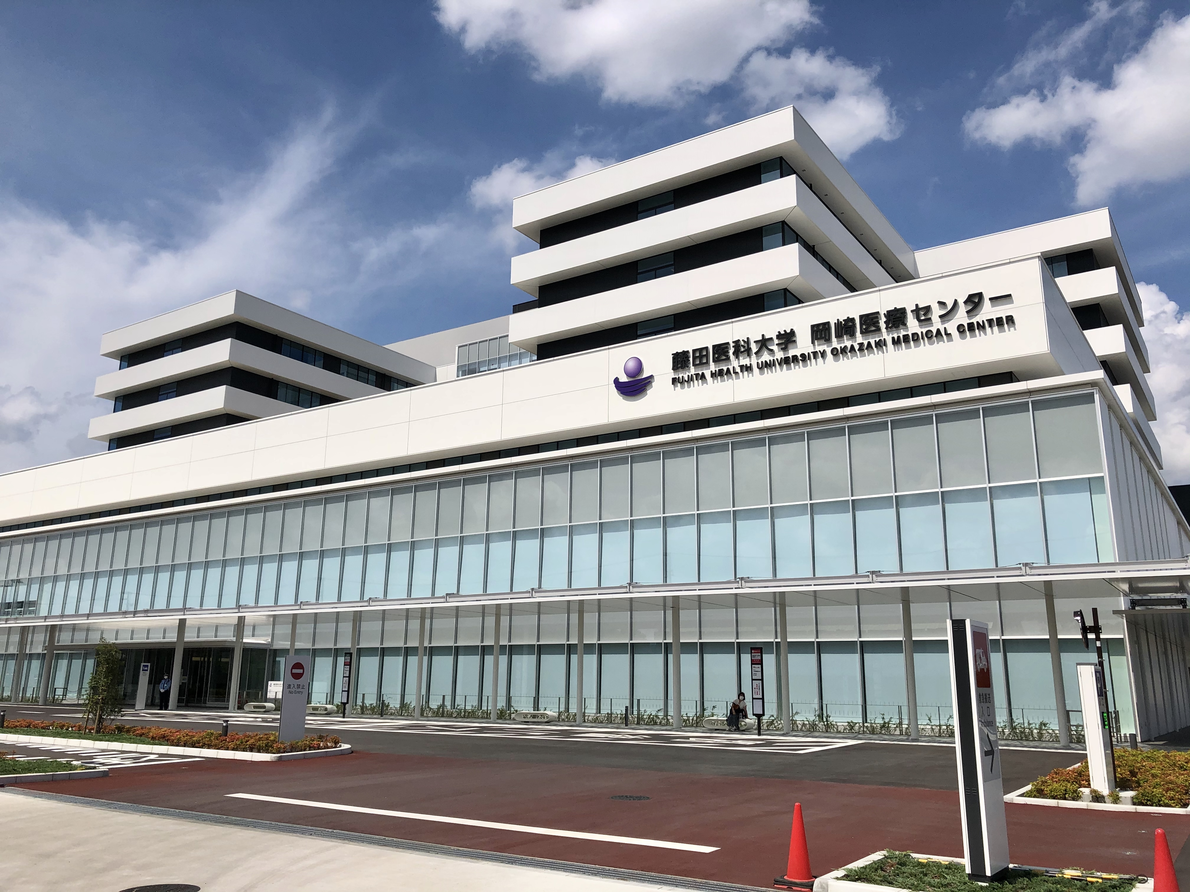 藤田医科大学岡崎医療センター（岡崎市針崎町）